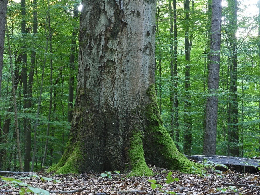 Naturdenkmal Wotansborn im Steigerwald mit historischem Buchenbestand